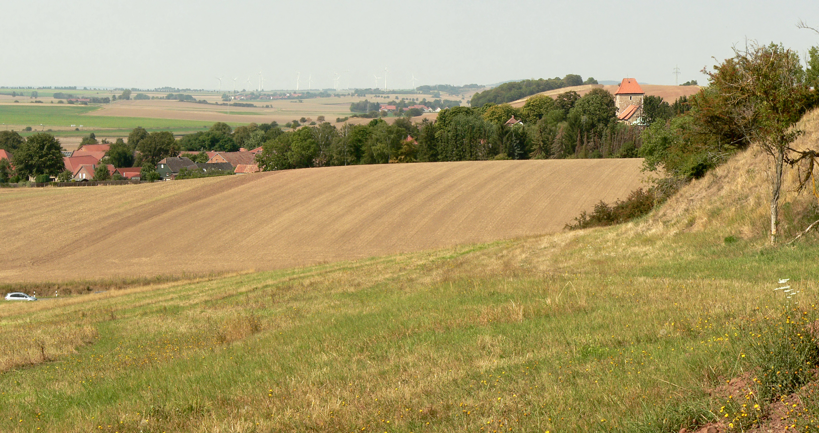 Geländesporn mit der Kreisgrabenanlage von Watenstedt von Osten von der Hünenburg bei Watenstedt, rechts der Wall der Hünenburg